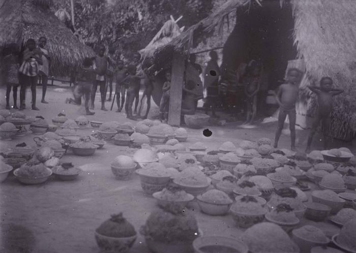 Foto. Als rituele afsluiting van een rouwperiode worden voedseloffers bij het ljikenhuisje gebracht (in westers servies), en geofferd aan de voorouders van de overledene en de overledene zelf. Zichtbaar zijn rijstbollen met vlees (van schildpad) en gebakken kippeeieren in grote schalen.. Door gasten meegebrachte maaltijden tijdens het dodenfeest in een marrondorp